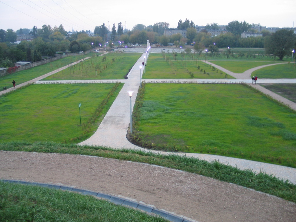 Park Ocalałych w Łodzi - widok na park